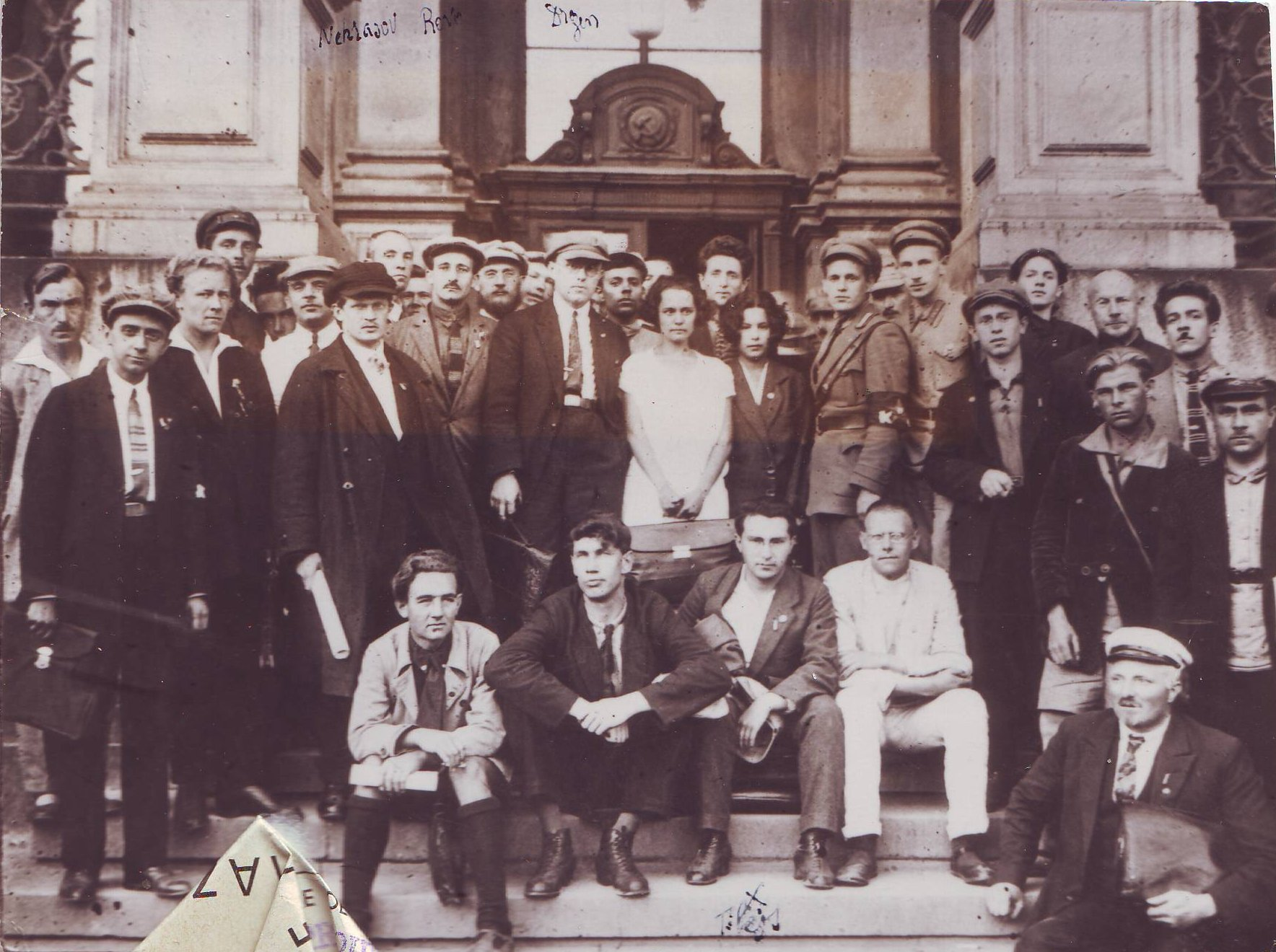 Foto de kelkaj el la partoprenantoj en la SAT-Kongreso en Leningrado, 1926. Skanita el la fotoarĥivo de SAT, uzebla kun mencio de la fonto